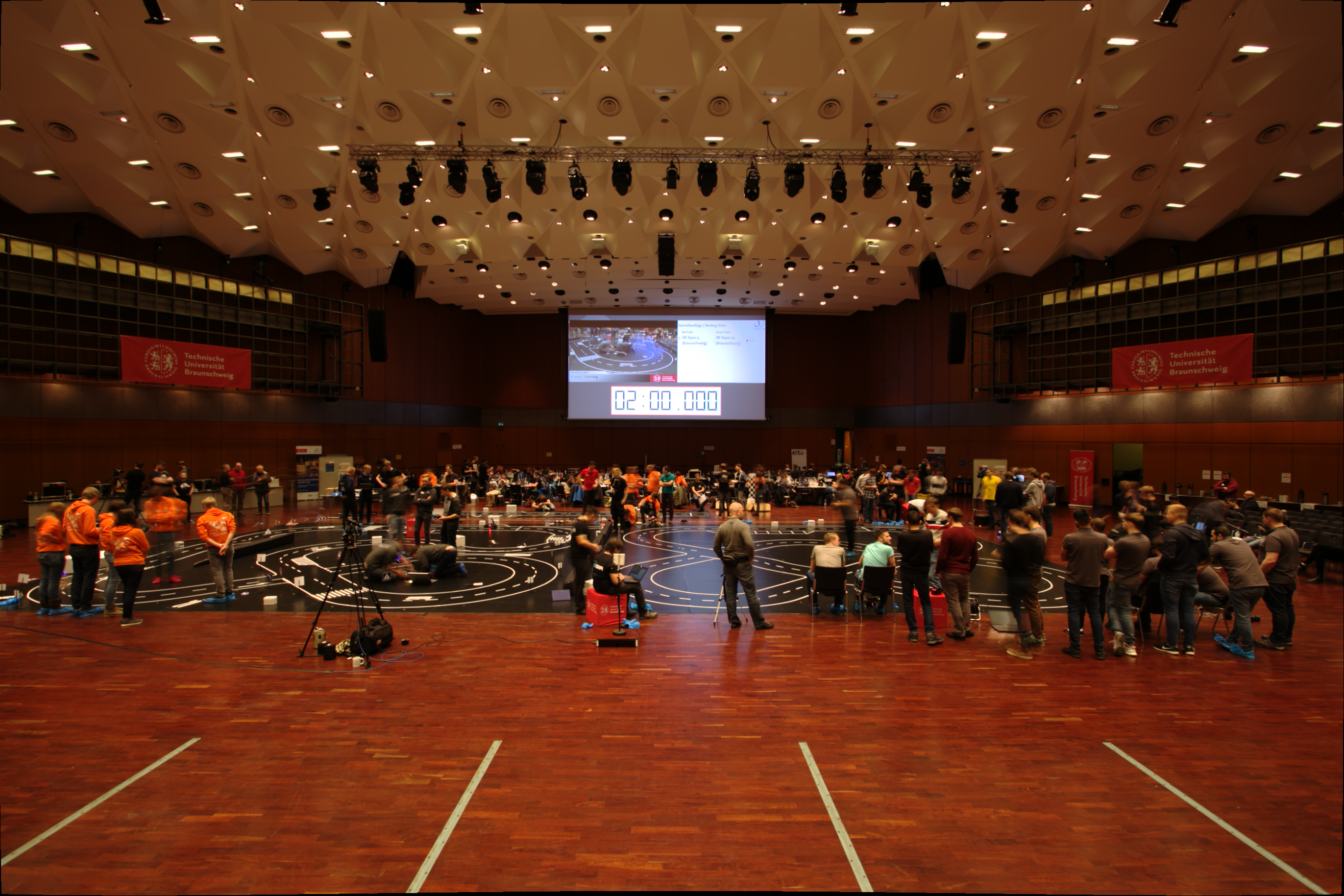 Stadthalle Braunschweig während des Carolo-Cup 2019, freies Training